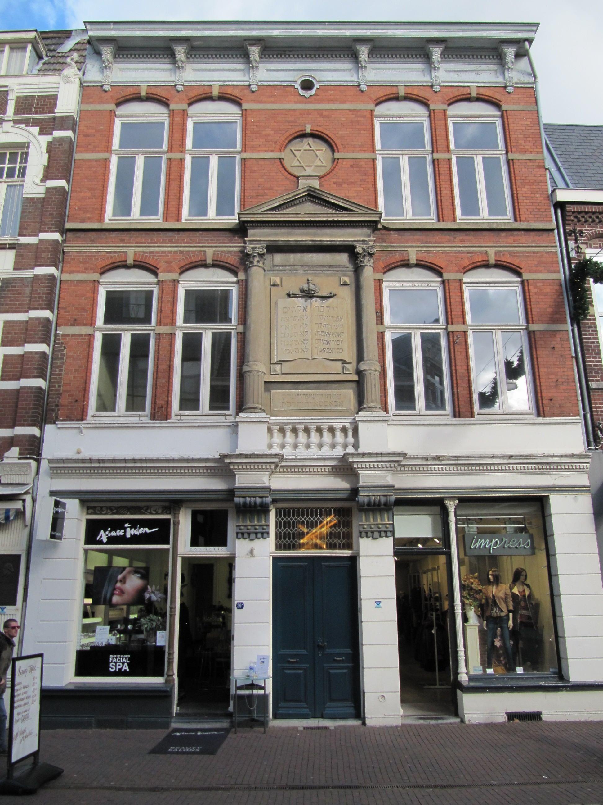 RM520524 Roermond - synagoge.jpg